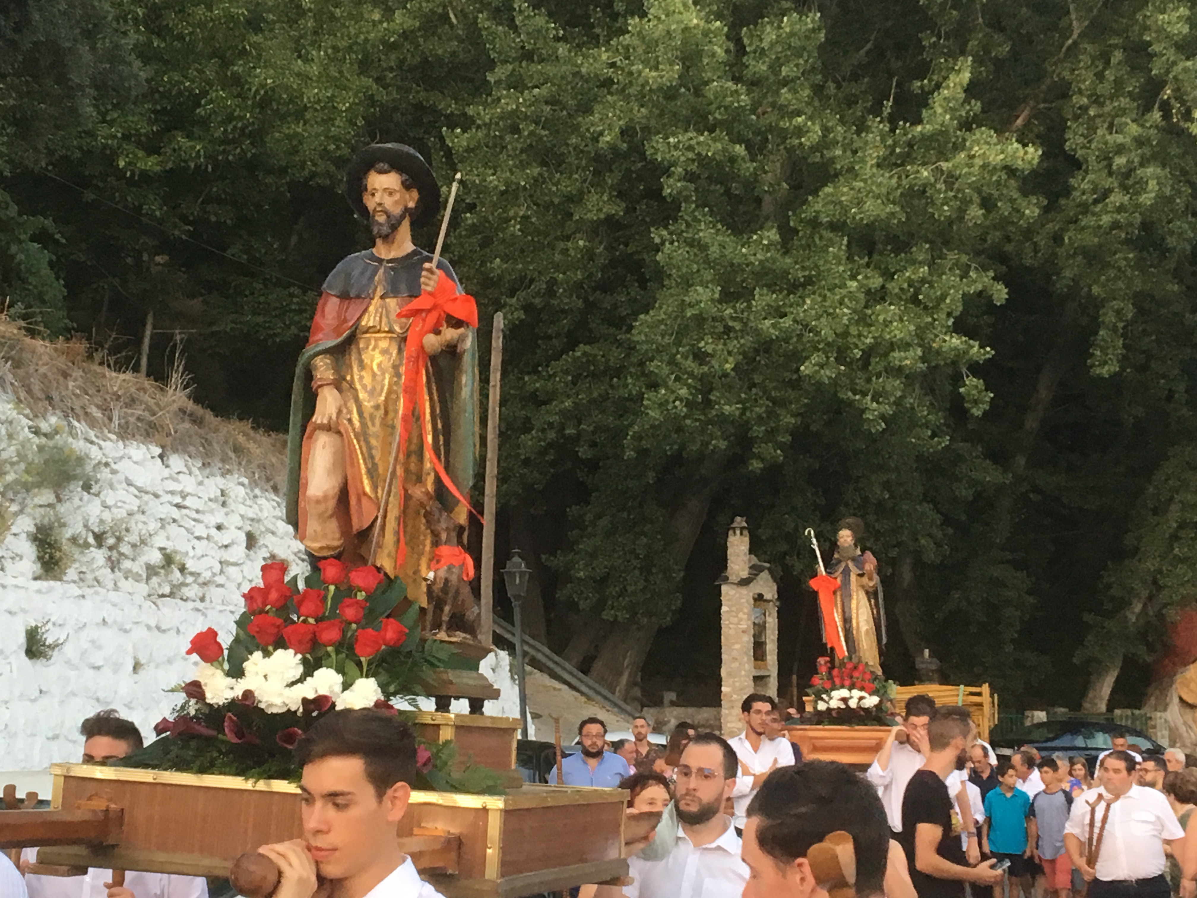 Procesión de San Roque y San Antón